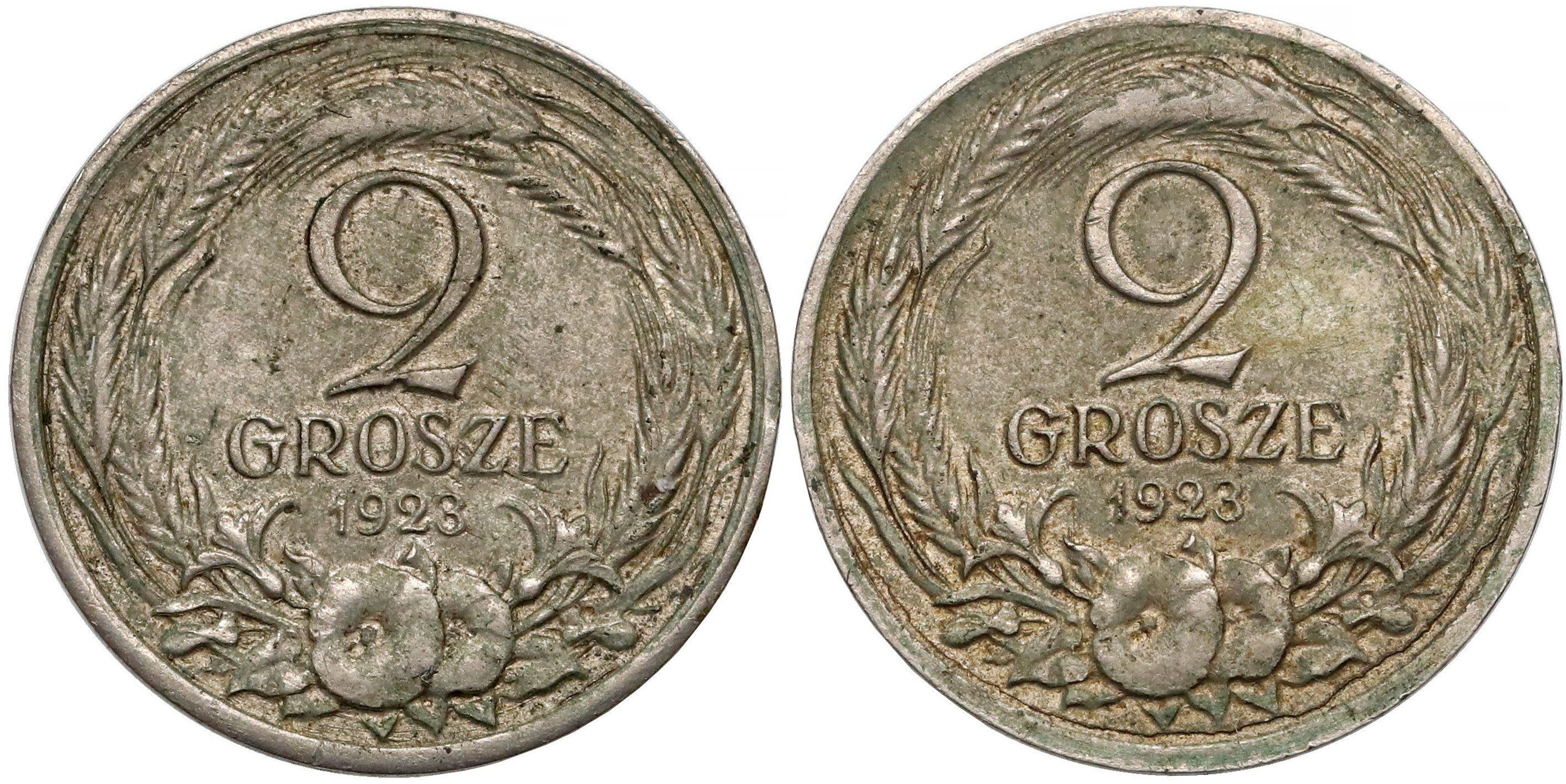 Próba 2 grosze 1923 z dwoma rewersami